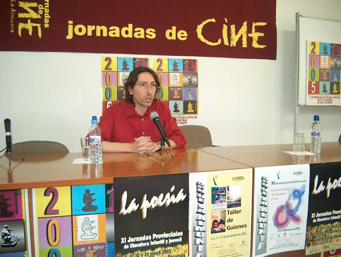 David Trueba en las XII Jornadas de Cine ‘Villa de La Almunia’, mayo de 2007.